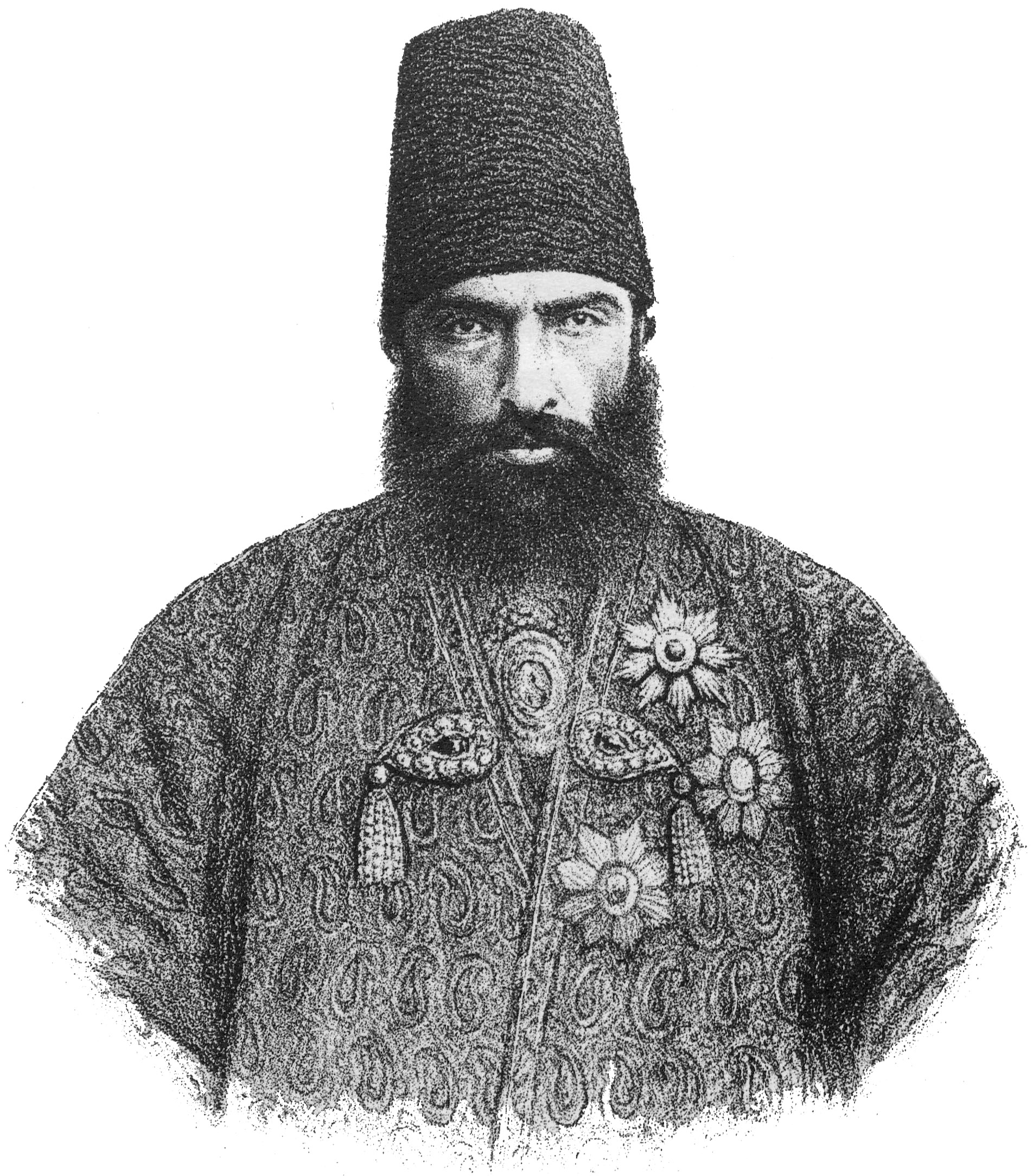 علیرضاخان عضدالملک وزیر حضور همایون